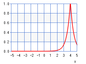 نمای توزیع لاپلاس با متغیرهای ۴ و ۰.۵